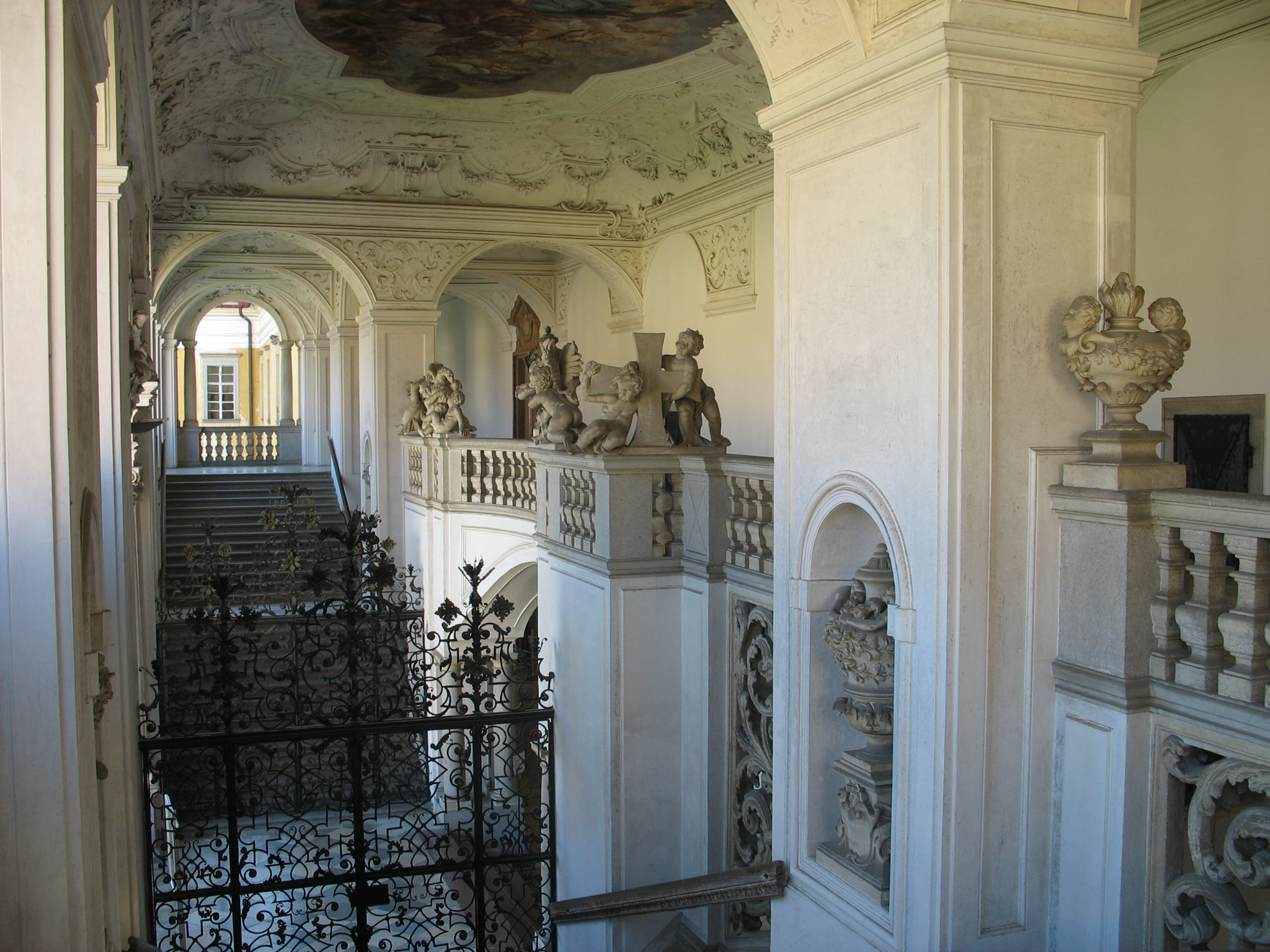 Stift St. Florian, Oberösterreich: Treppenhaus